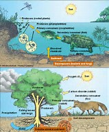 சூழ்நிலை மண்டலம்